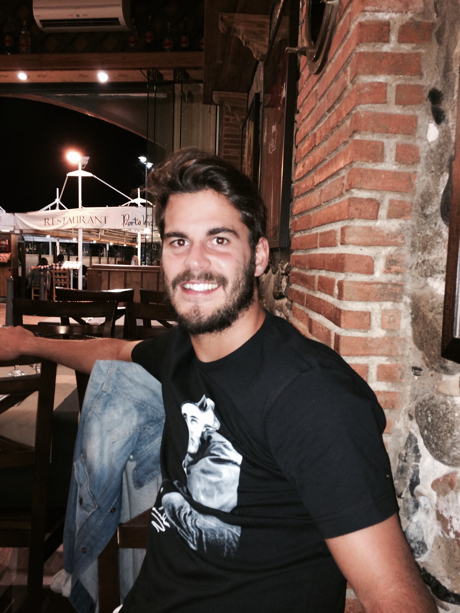 Eduard Oriol Gracia